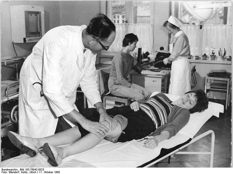 Leipzig, DHfK, Äztliche Untersuchung Zentralbild Wendorf, Kohls Sd-Fr 11.10.1960 10 Jahre Deutsche Hochschule für Körperkultur in Leipzig. Die Deutsche Hochschule für Körperkultur, die im Oktober 1950 gegründet wurde, begeht am 22.10.1960 ihr 10jähriges Bestehen. Mit 80 Studenten und 10 Lehrkräften wurde der Lehrbetrieb aufgenommen. Bereits am 17. Mai 1952 legte der große Förderer des Sports und Erste Sekretär des ZK der SED, Walter Ulbricht, den Grundstein für den Neubau. Heute sind der DHfK eine eigene Arbeiter- und Bauernfakultät, die Forschungsabteilung, eine Abteilung Fernstudium mit 9 Außen- und 3 Nebenstellen, die Trainerabteilung und der Sportclub Wissenschaft der DHfK angeschlossen. Zur Zeit studieren etwa 2000 Studenten an der DHfK. Rund 200 hauptamtliche Lehrkräfte sorgen für eine umfassende Ausbildung der Studenten zu Diplom- und Sportlehrern für allegemeine bildenede polytechnische Oberschulen. UBz: Kniegelenksuntersuchung durch Chefarzt Dr. Horst Burger bei der DHfK-Studentin Utta Sievers.